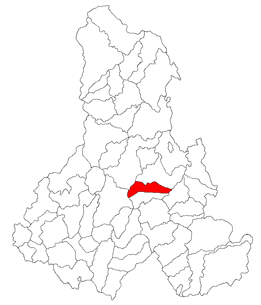 Categorie:Hărţi ale judeţului Harghita Contents 1 Licensing 2 Sursă 3 Licensing 4 Original upload log Licensing Sursă ro::Imagine:Harta_jud_Harghita.png